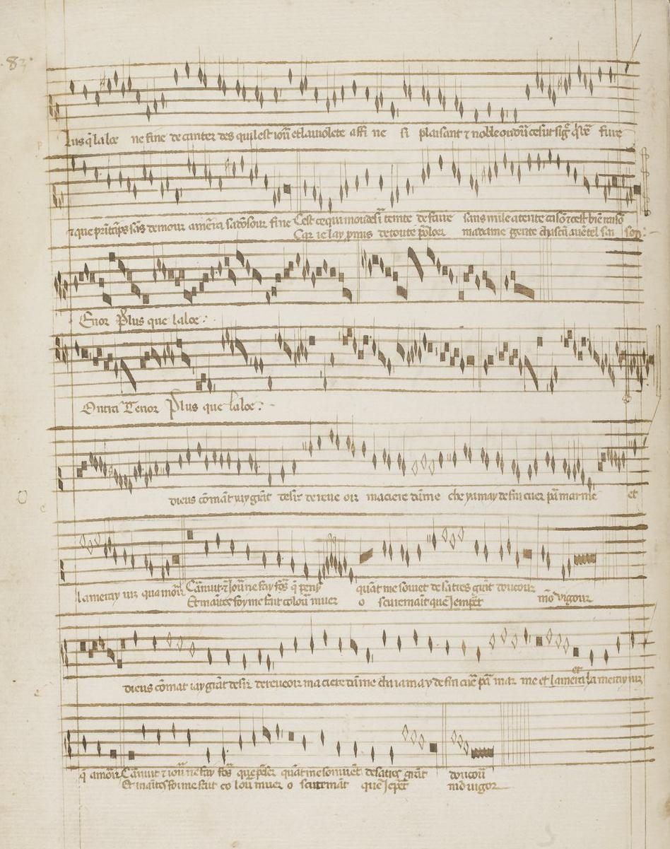 Codex Reina